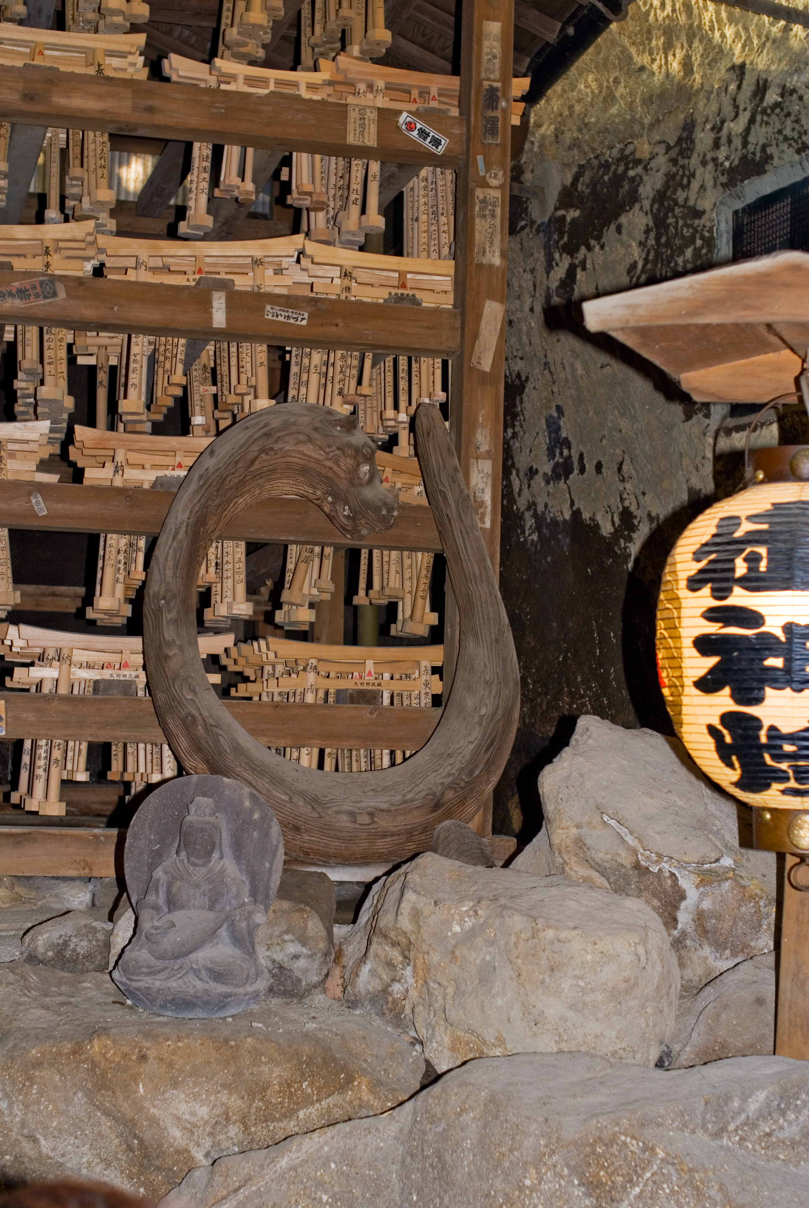 Zeniarai Benzaiten, Kamakura